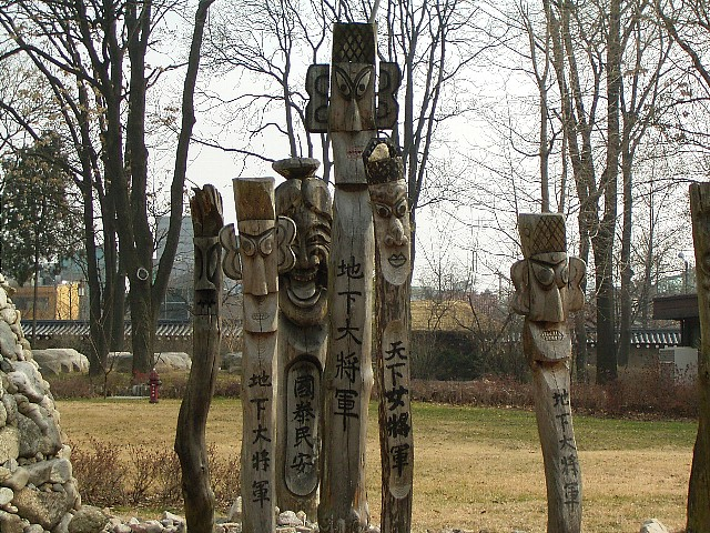 天下大将軍・地下女将軍